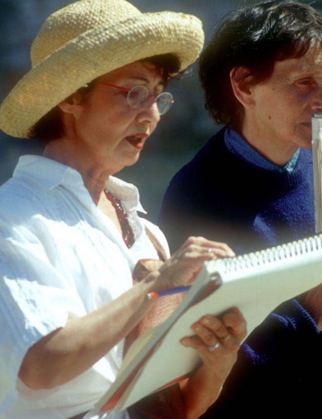 Saintes-Maries-de-la-Mer, touriste croquant sur le vif une scène du pèlerinage gitan